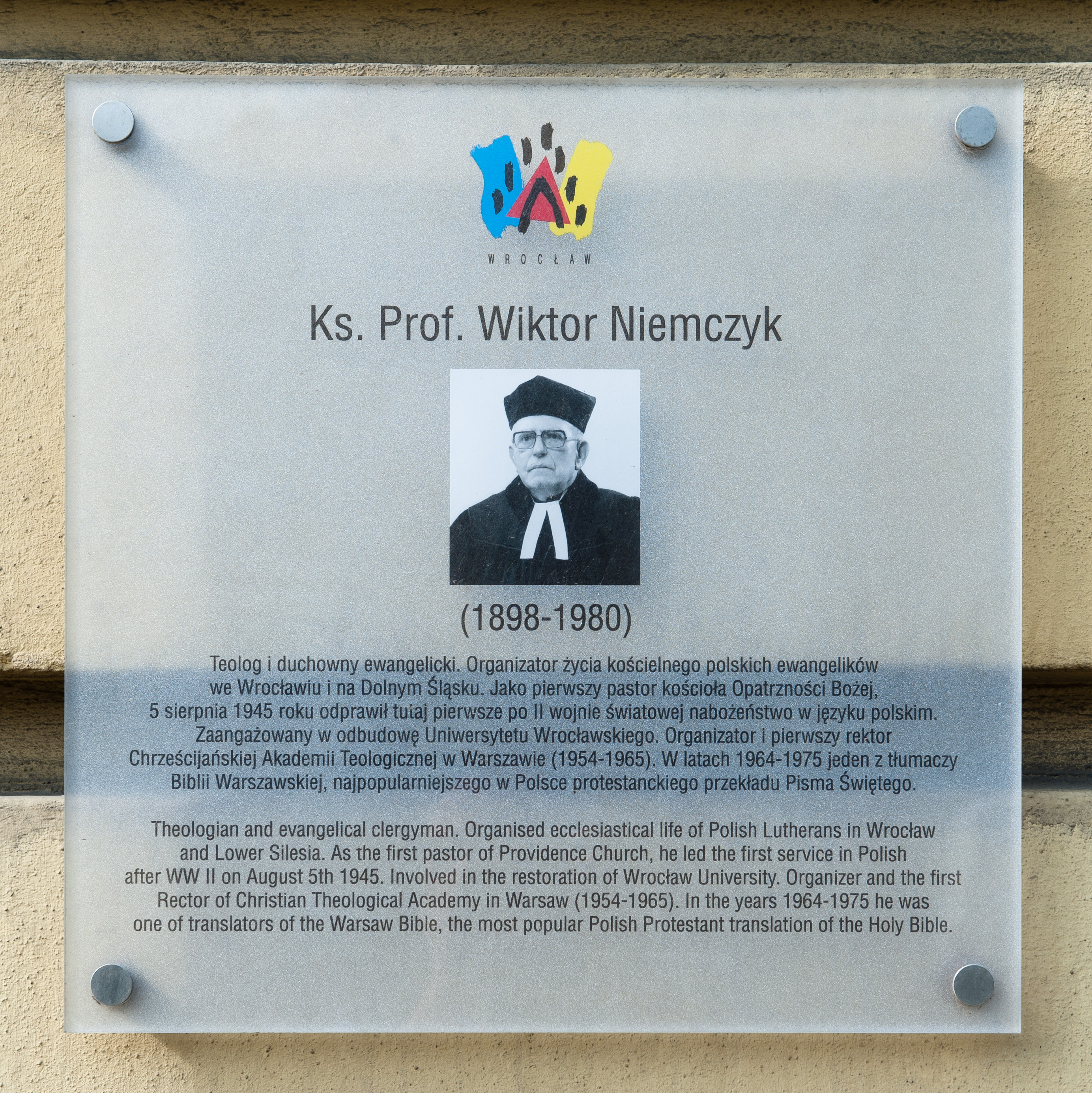 Tablica pamiątkowa poświęcona księdzu prof. Wiktorowi Niemczykowi przy wejściu do Kościoła Opatrzności Bożej we Wrocławiu, ul. Kazimierza Wielkiego.